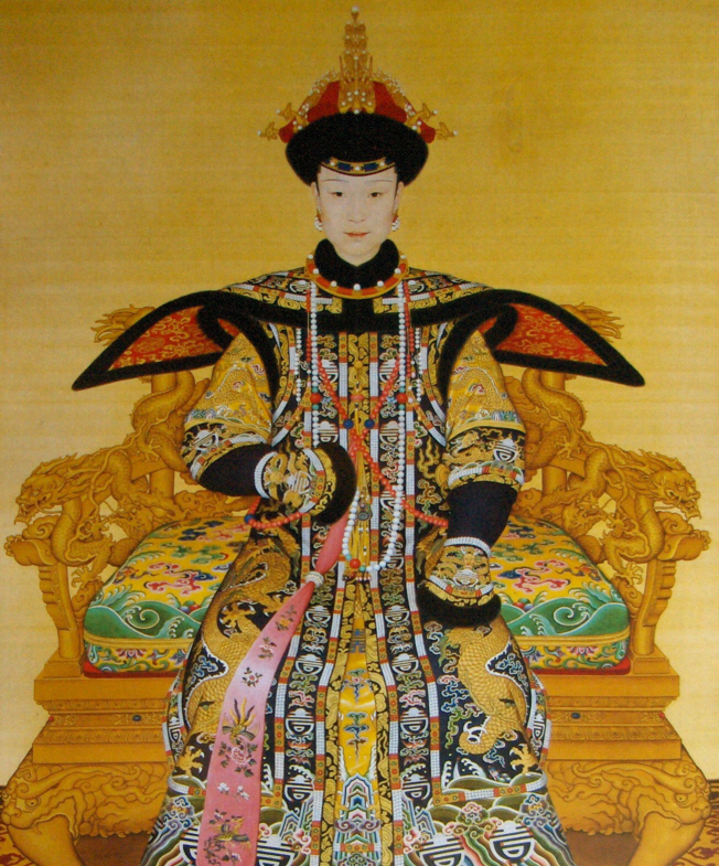 Empress Xiao Xian (Fucha)